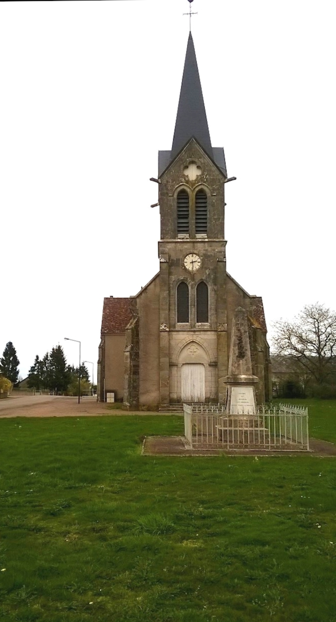 Pregxejo de Brazey-en-Morvan